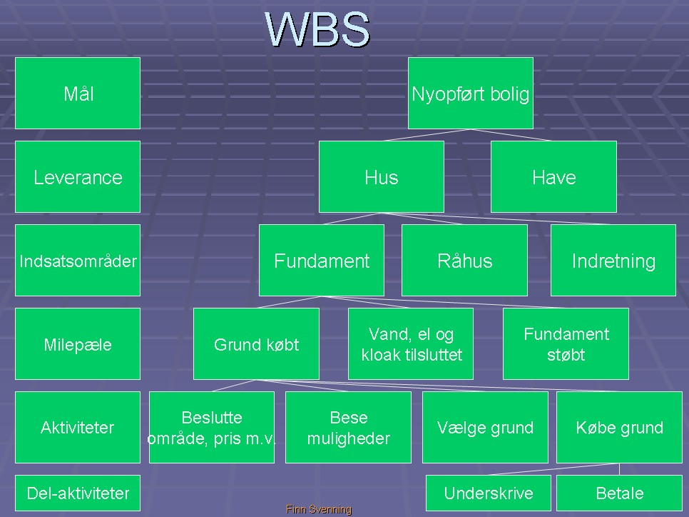 Eksempel på en WBS, Work Breakdown Structure for et byggeri af et hus.